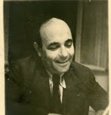 משה ליפשיץ